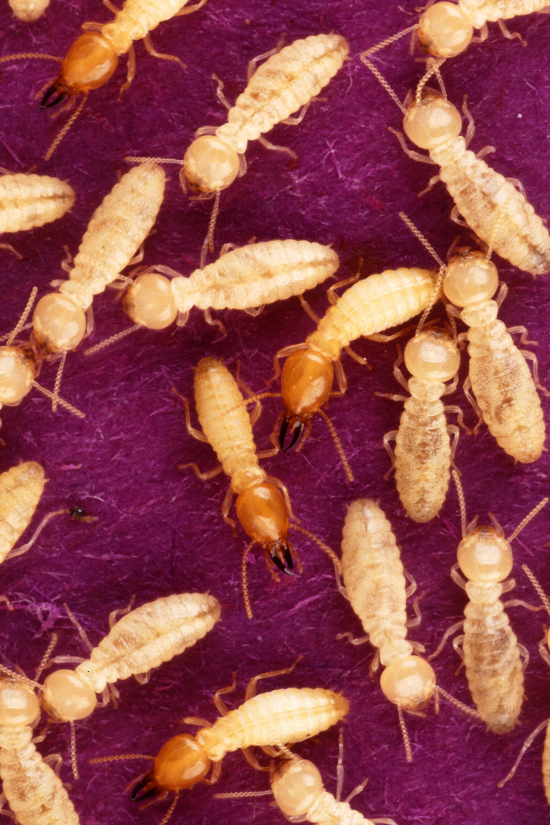 Coptotermes formosanus shiraki; Formosan subterranean termites(Termite), イエシロアリ(シロアリ)